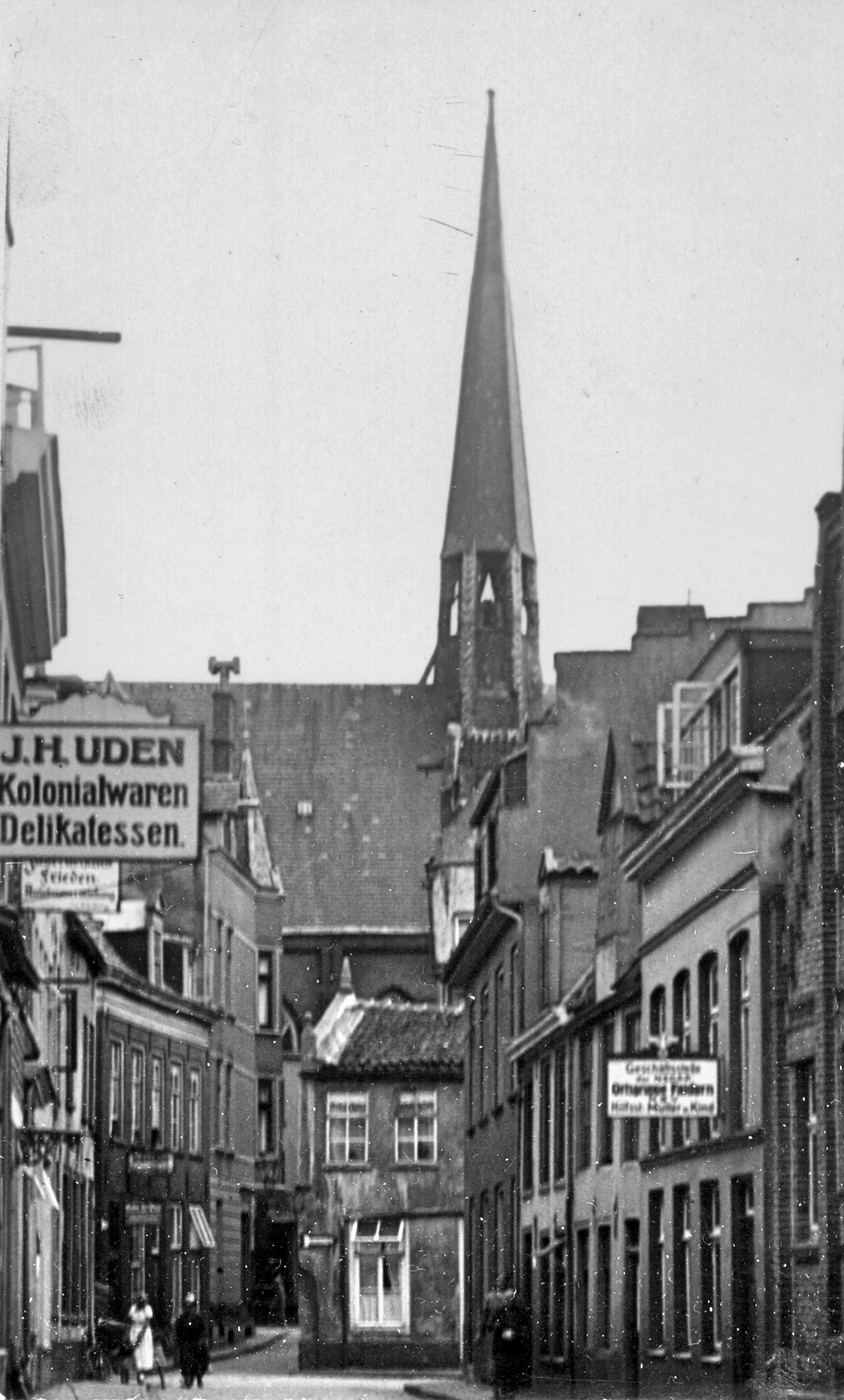 Blick auf den Turm der Gasthauskirche (Emden), die 1938 ausbrannte